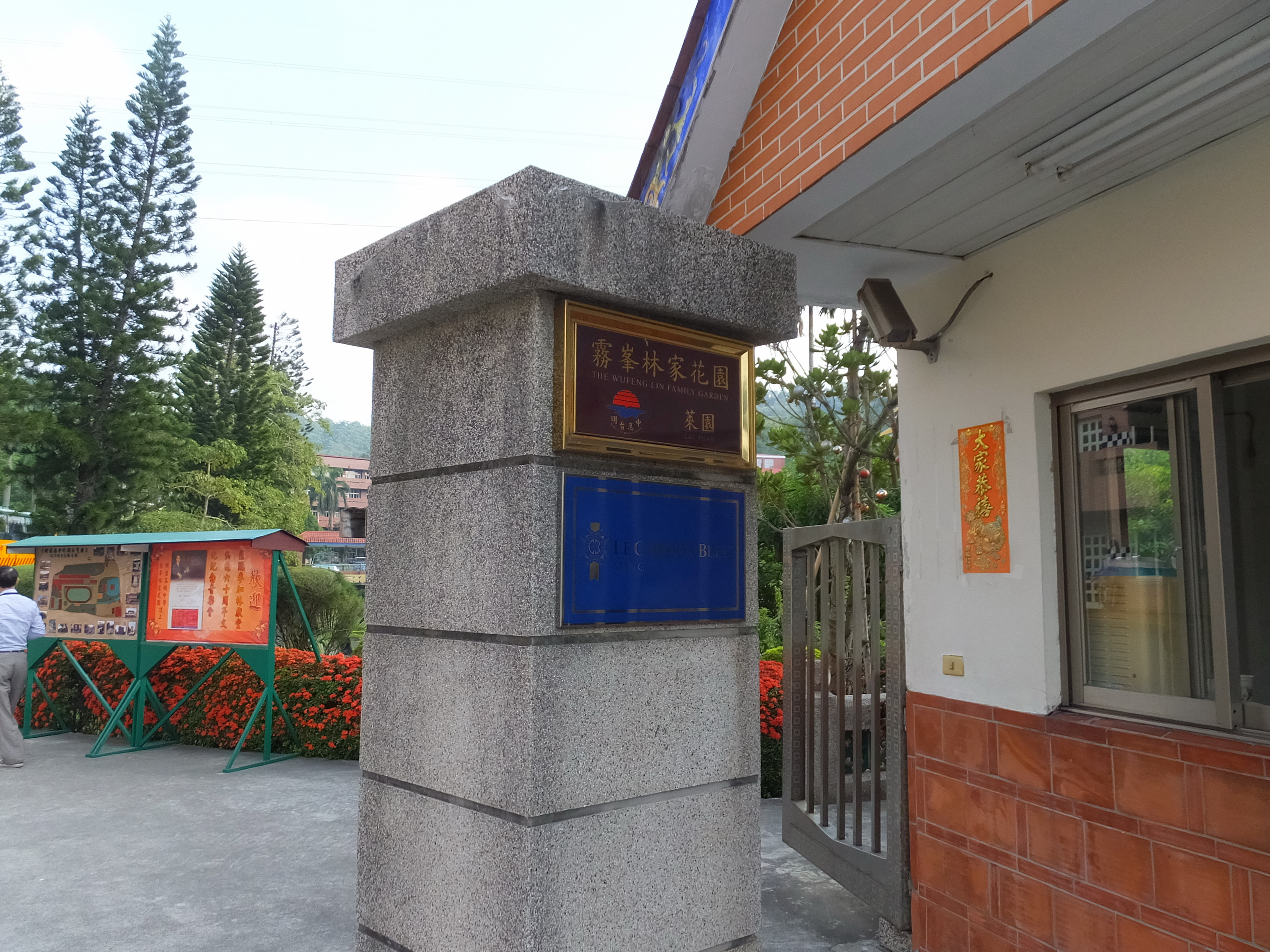 霧峰林家花園 Wufeng Lin Family Garden